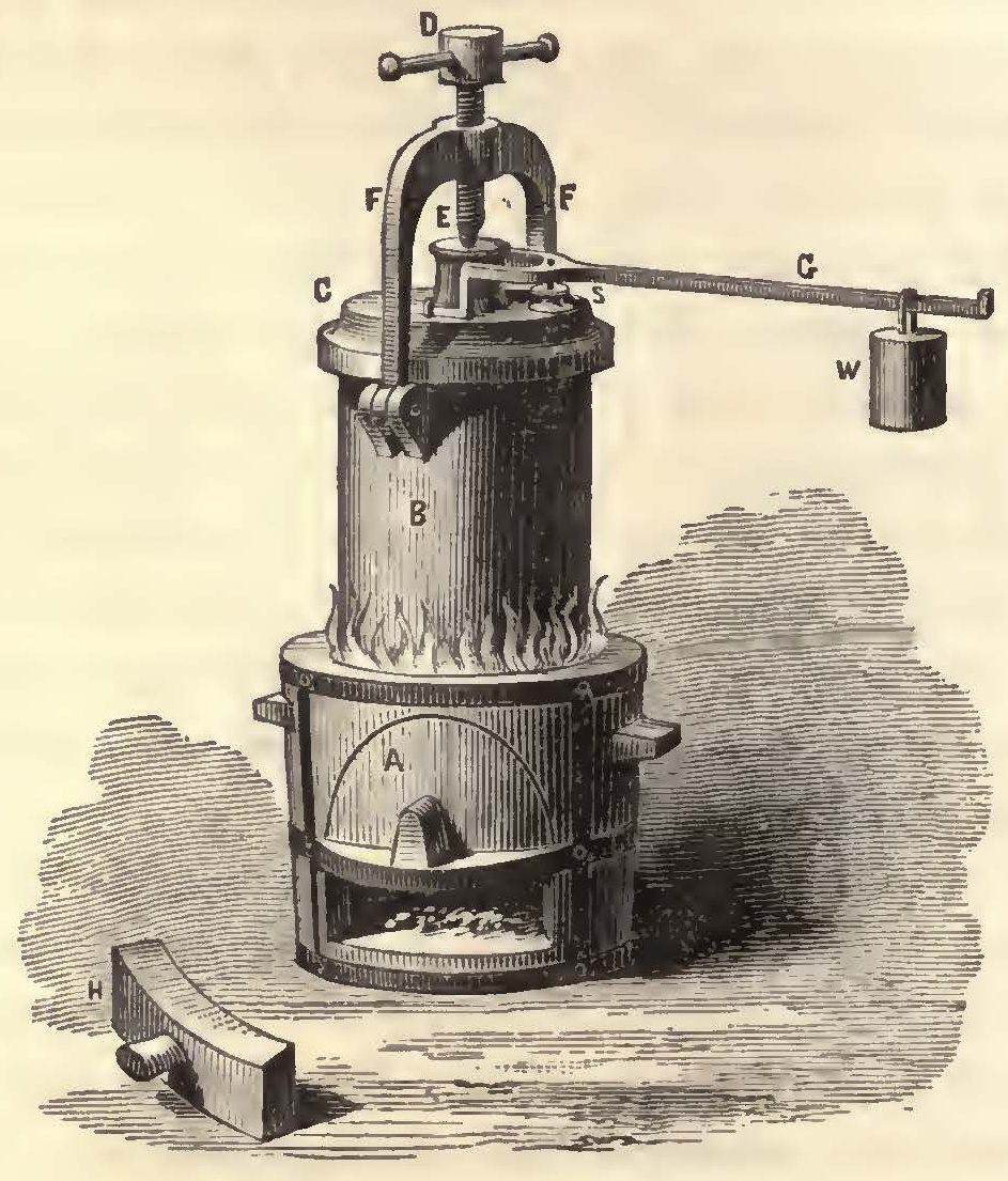 ドニ・パパンのスチーム・ダイジェスター